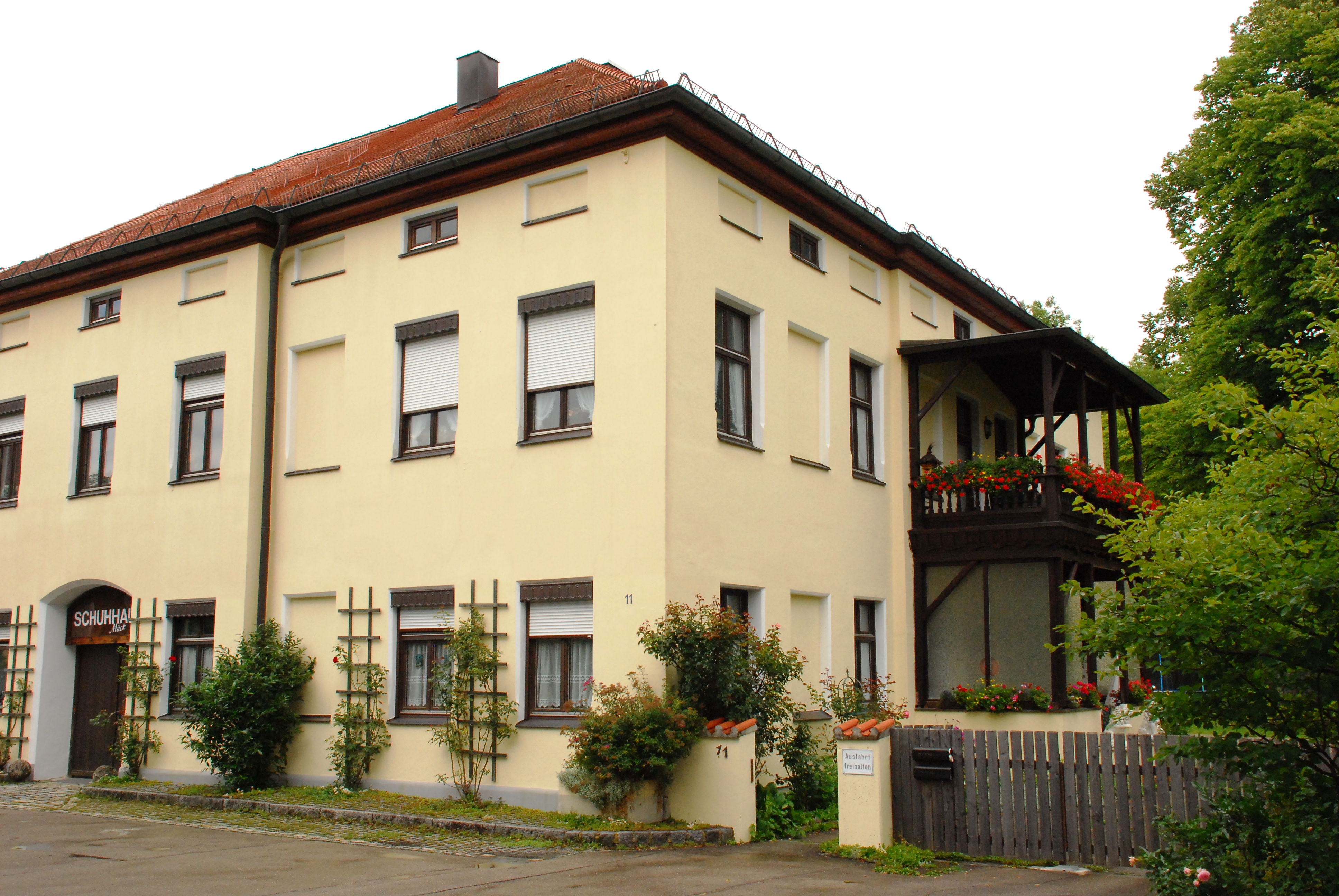 Ehemaliges Hofmarksschloss in der Rosenheimer Straße 11 in Höhenkirchen, Gemeinde Höhenkirchen-Siegertsbrunn, Landkreis München, Regierungsbezirk Oberbayern, Bayern. Als Baudenkmal in der Bayerischen Denkmalliste unter Aktennummer D-1-84-127-5 aufgeführt. Foto gemäß den Voraussetzungen zur Panoramafreiheit von öffentlicher Verkehrsfläche aus aufgenommen.